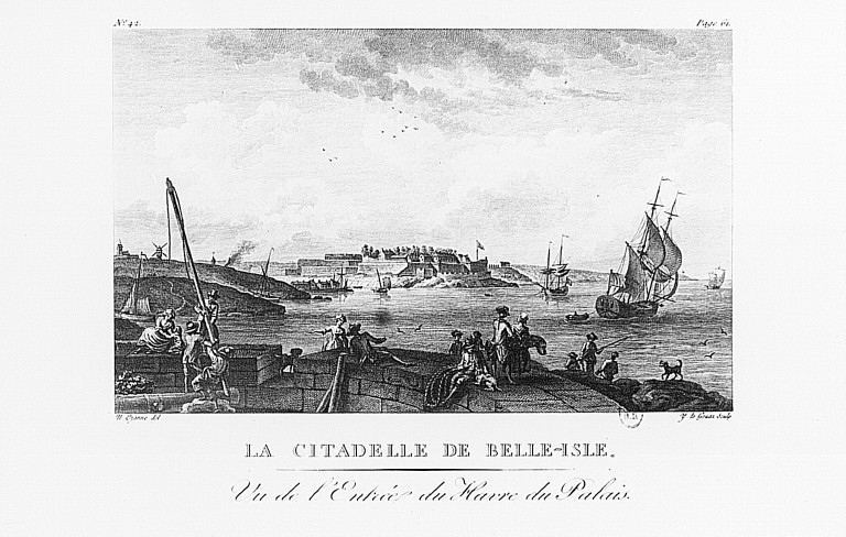 La citadelle de Belle-Isle. Bretagne, Famille Le Clerc.